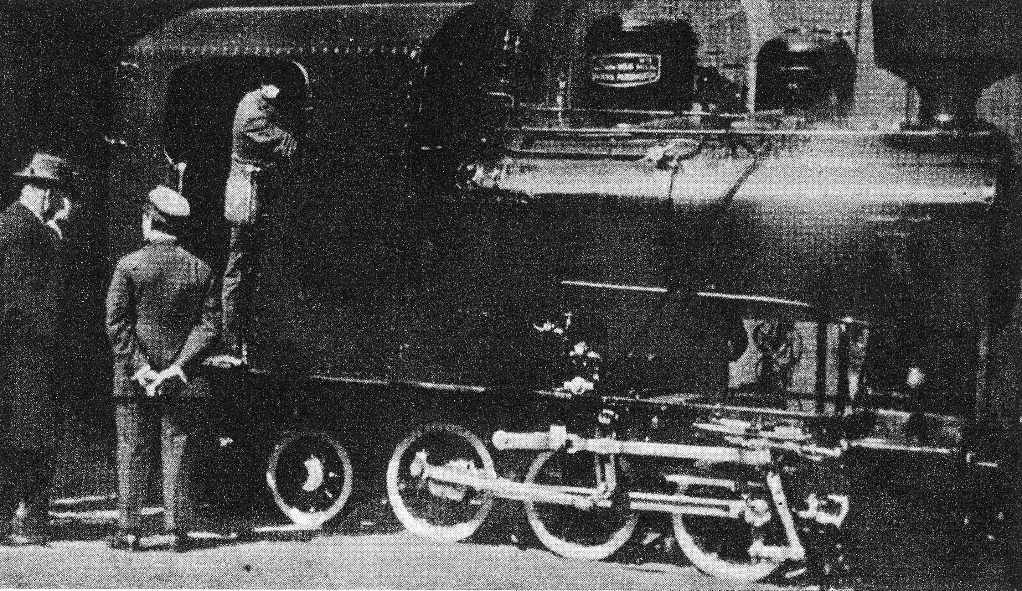 Lokomotywa Cukrowni Kruszwica nr 13 (późn. 7), WSABP 59/1927, C1n2t. Warszawska Spółka Akcyjna Budowy Parowozów